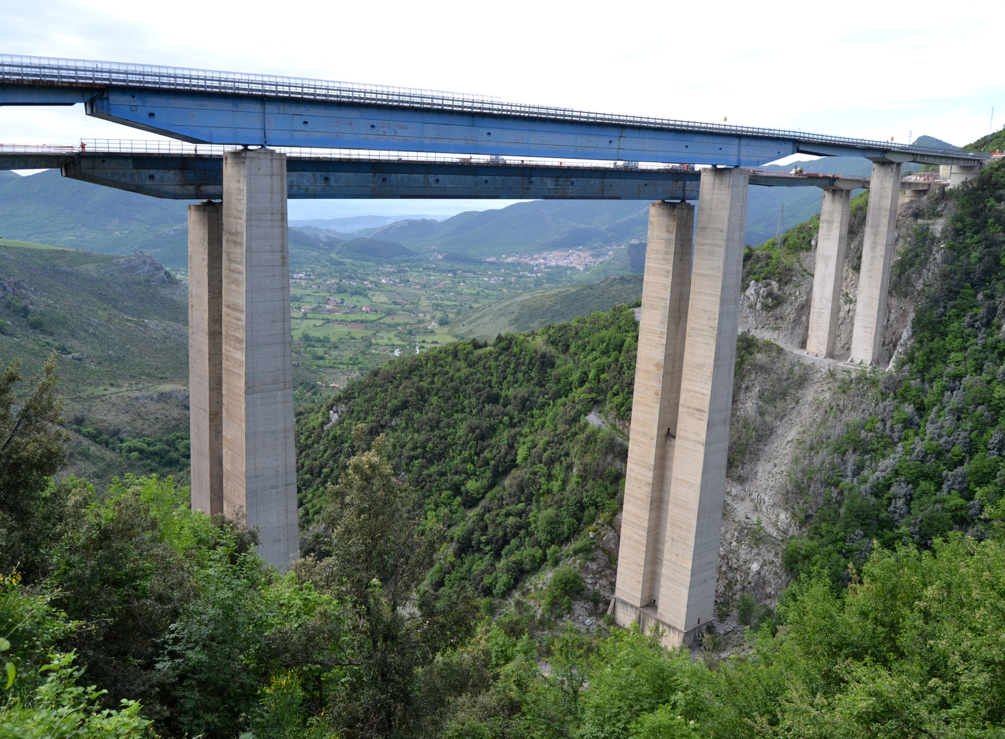 Viadotto Rago sull'autostrada Salerno-Reggio Calabria.